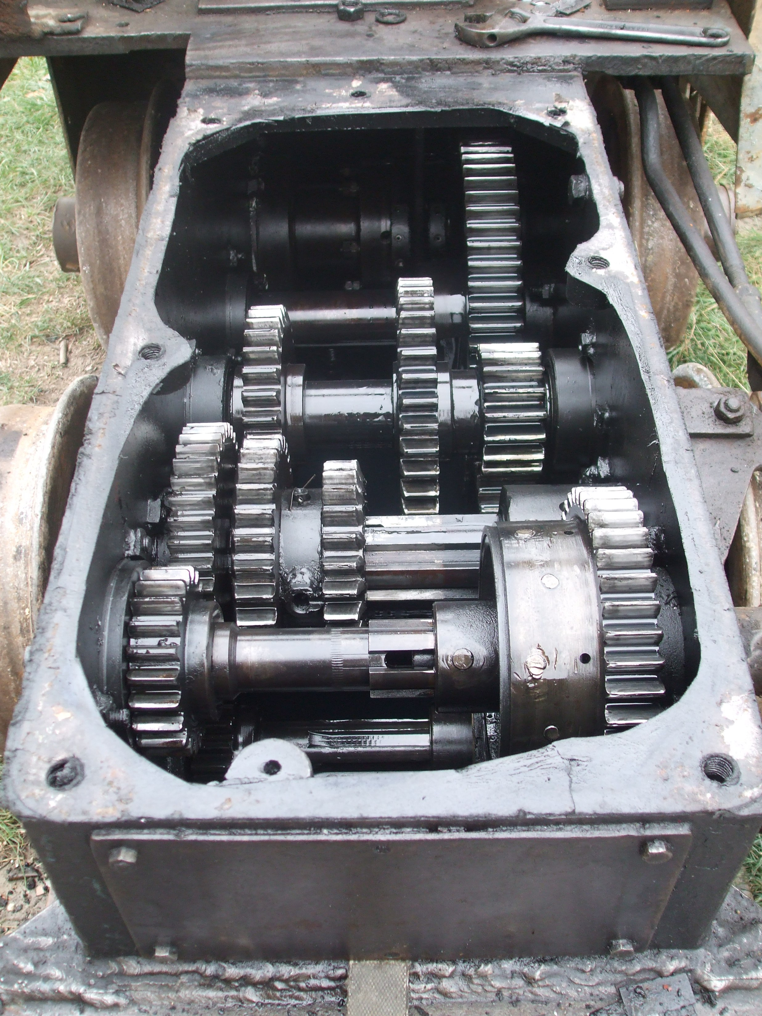 A Motoros Vontató típusú kisvasúti mozdony hajtóműve. Az előtérben a dörzskapcsolós irányváltó, a kép közepén pedig a két sebességes sebességváltó látható.